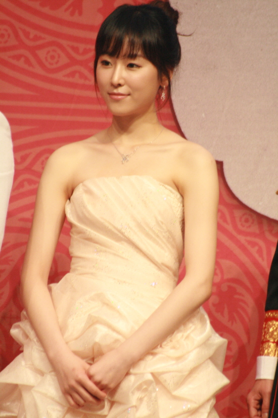 뮤지컬 궁 제작발표회